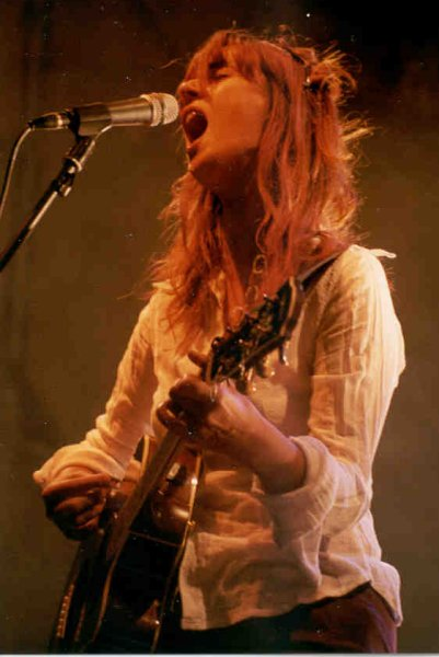 Cristina Donà in concerto a Firenze, Parco delle Cascine, 22 luglio 2000